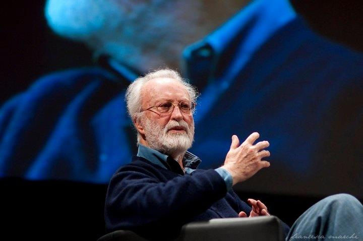 Eugenio Scalfari al Festival Internazionale del Giornalismo di Perugia.